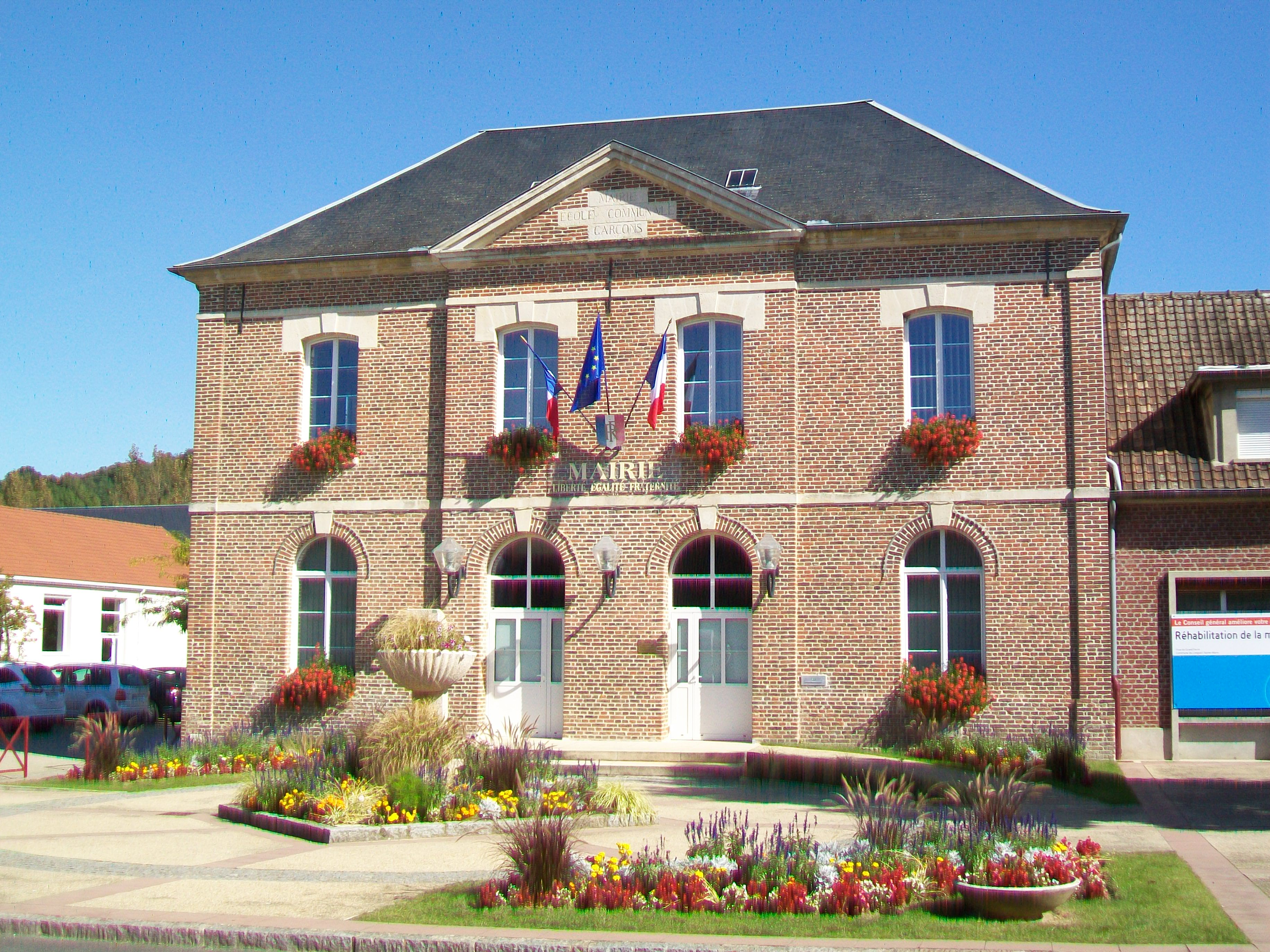 La mairie, rue du Grand Ferré.